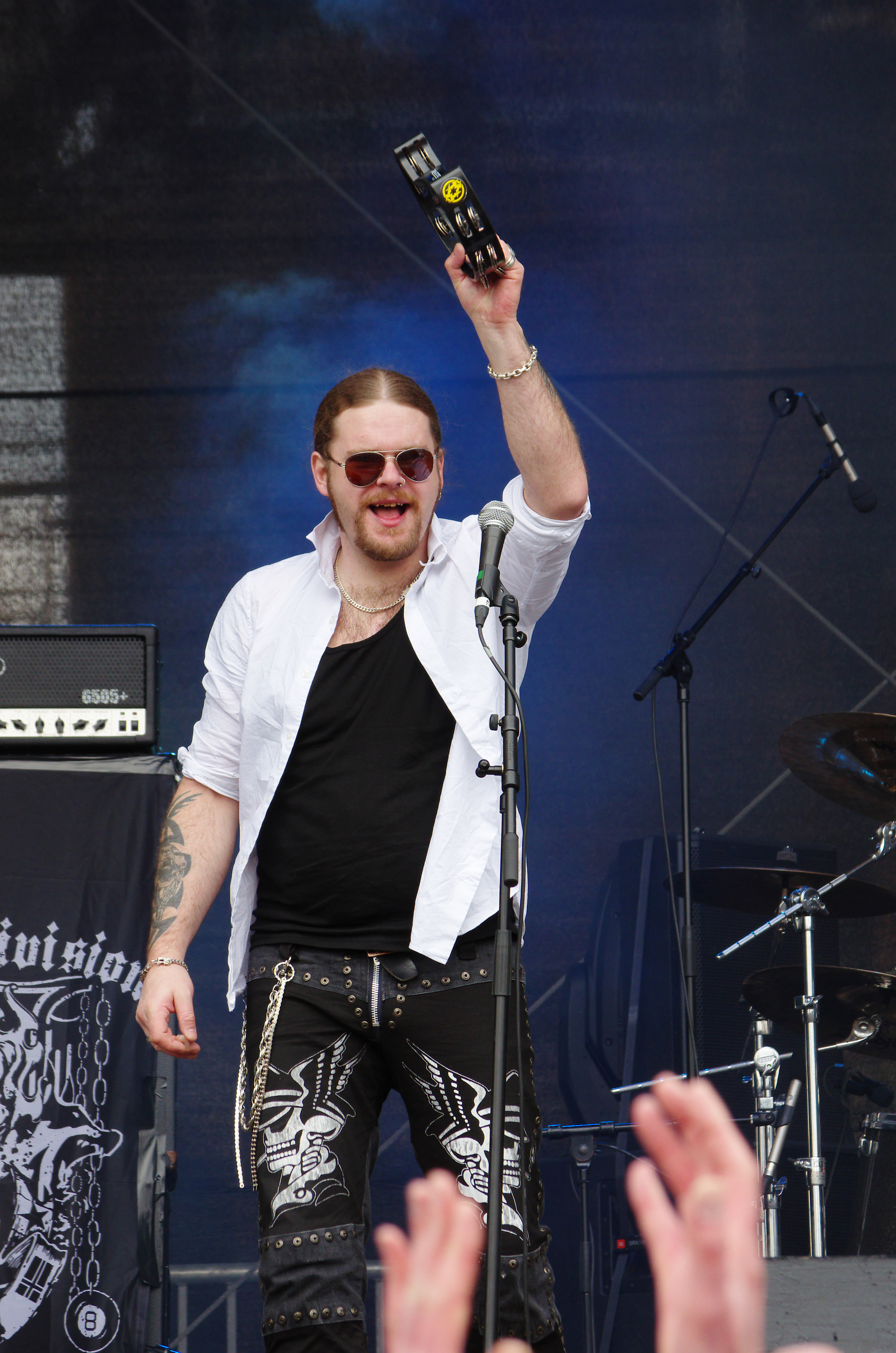 Chrome Division, Metal-Band um Stian Tomt Thoresen (aka Shagrath), Auftritt bei Rock in den Ruinen 2013 in Dortmund. Pål Mathiesen (Shady Blue)